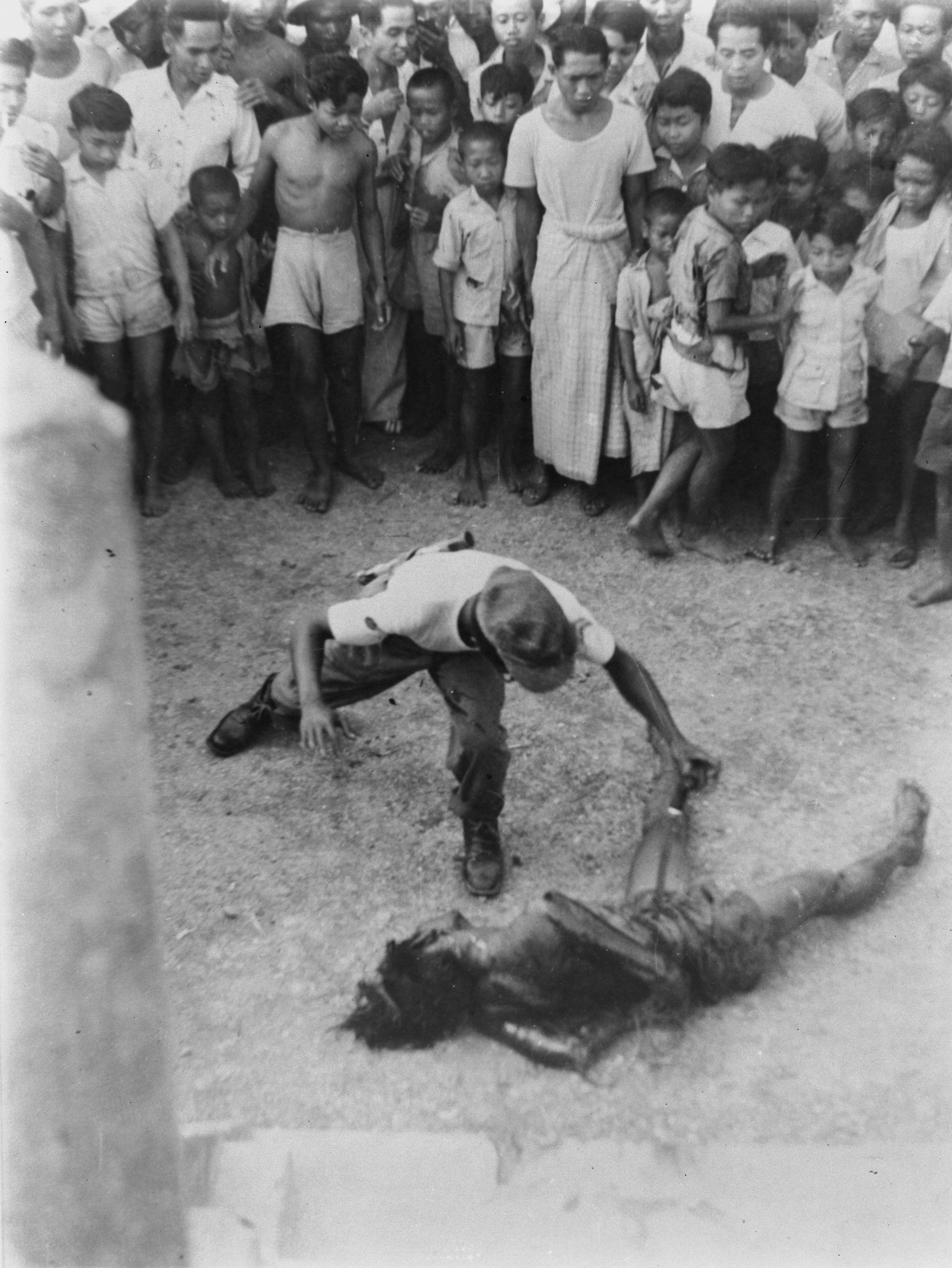 Collectie / Archief : Fotocollectie Dienst voor Legercontacten Indonesië Reportage / Serie : [DLC] Foto's gedode communisten door de TNI [gemaakt te Madioen, september 1948] Beschrijving : Hevig bloedende man wordt met bajonet of kris gestoken. Rondom nieuwsgierige kijkers, waaronder veel kinderen Datum : september 1948 Locatie : Indonesië, Nederlands-Indië Fotograaf : Fotograaf Onbekend / DLC Auteursrechthebbende : Nationaal Archief Materiaalsoort : Negatief (zwart/wit) Nummer archiefinventaris : bekijk toegang 2.24.04.02 Bestanddeelnummer : 8805